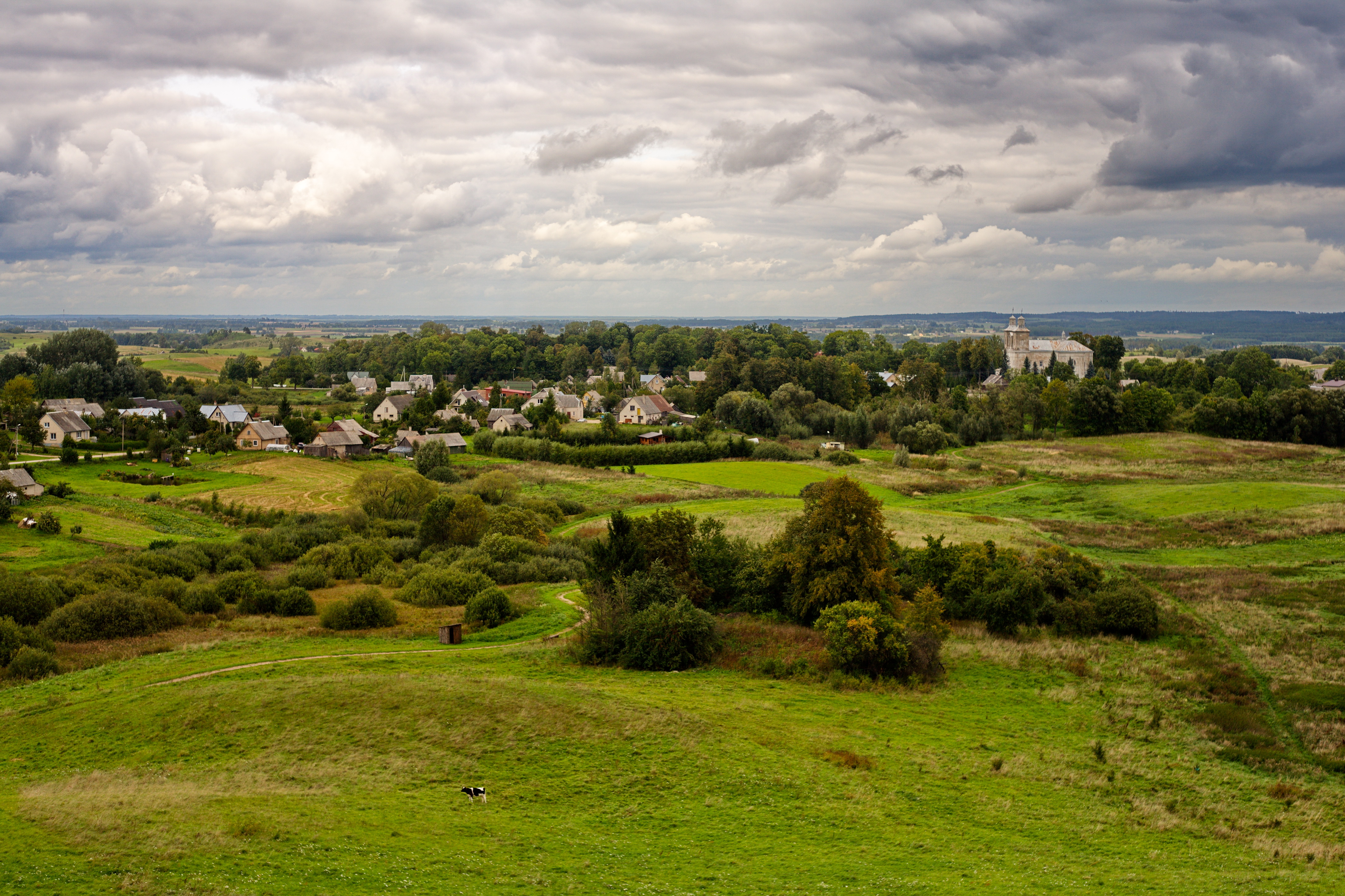 Rudaminos miestelio panorama